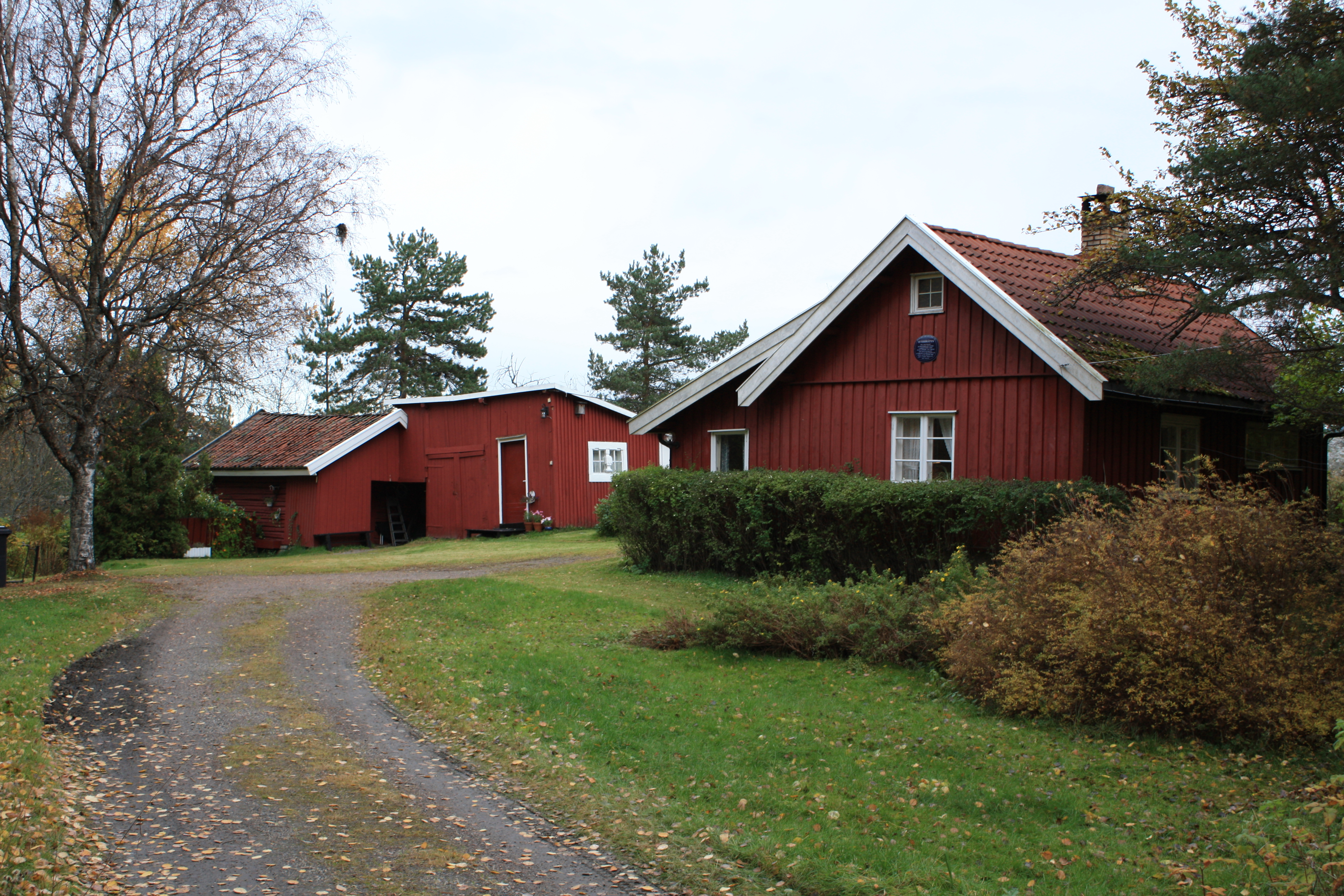 Bildet viser Seterbråten, en husmannsplass fra 1700-tallet.